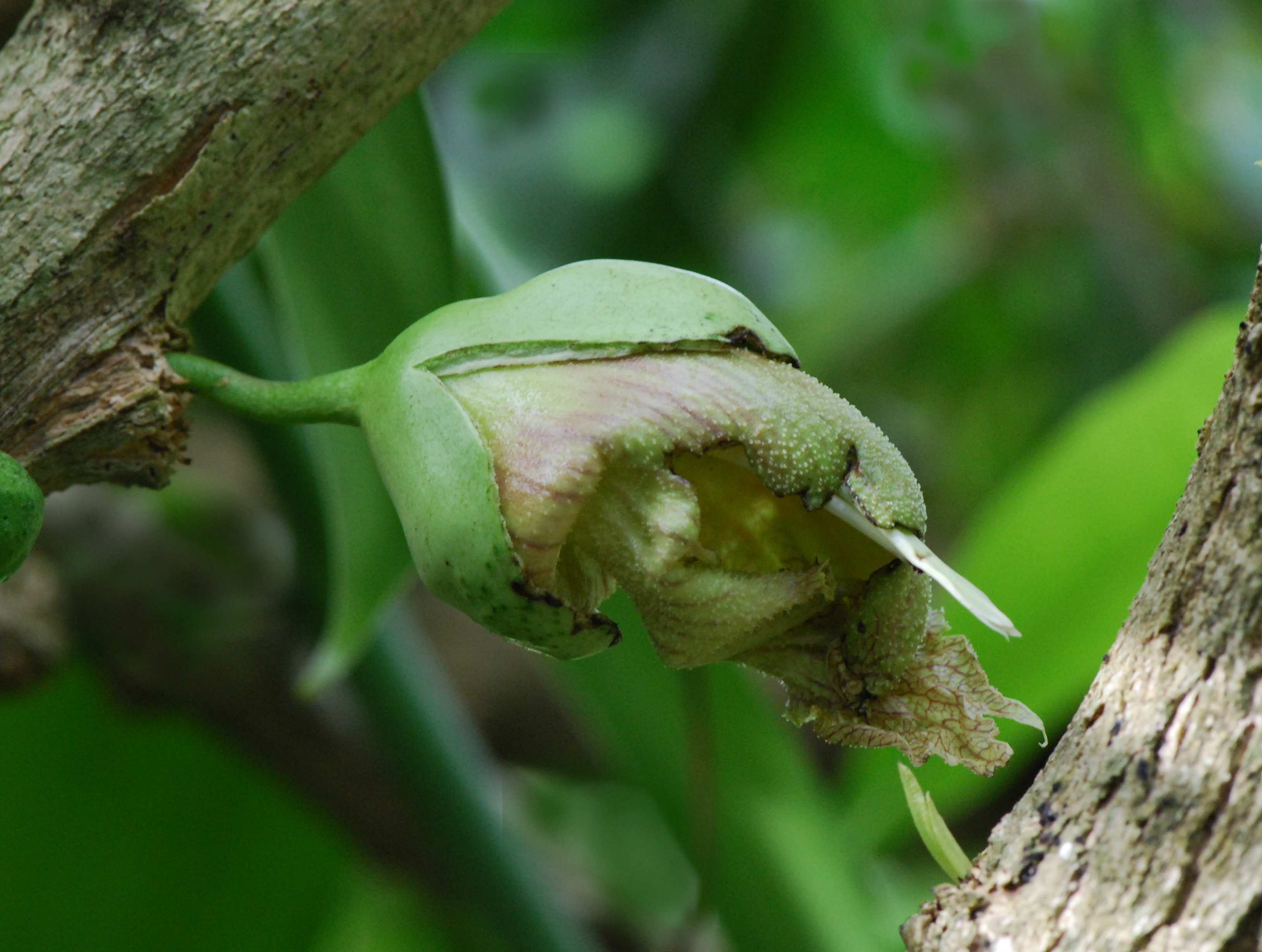 Crescentia cujete, fleur, Martinique